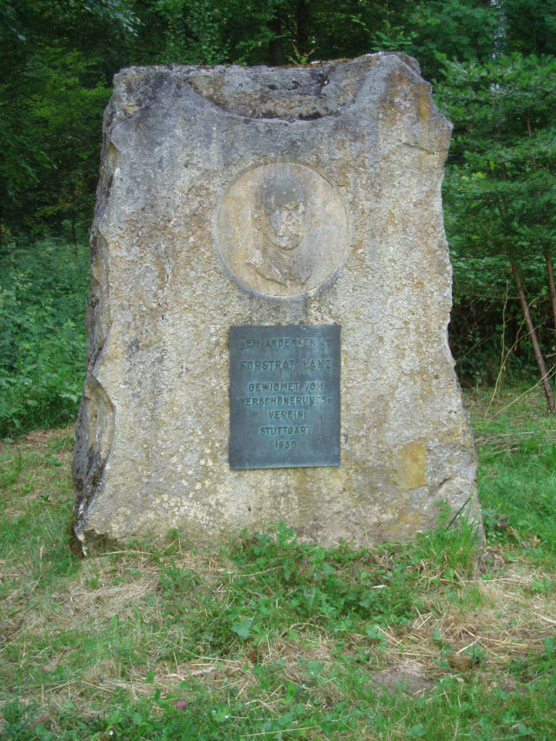 Denkmal für Forstrat Lanz